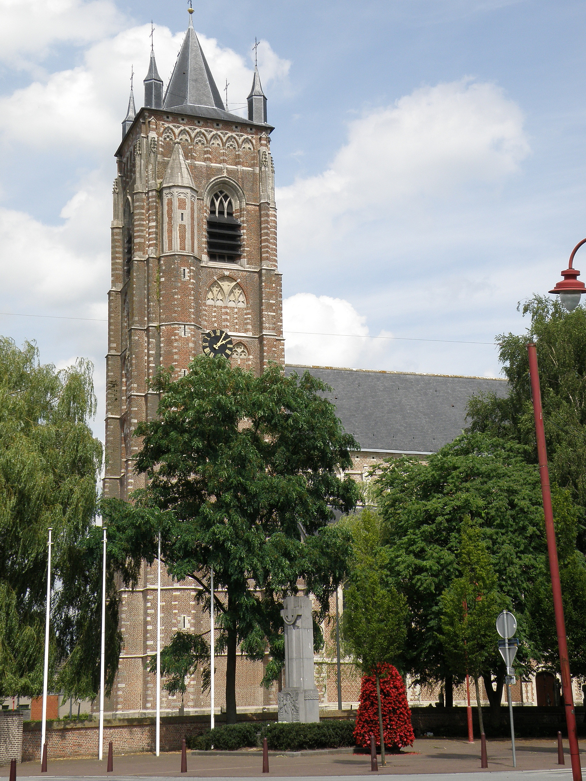 Sint-Lenaarts, deelgem. van Brecht (provincie Antwerpen, België). Sint-Leonarduskerk.